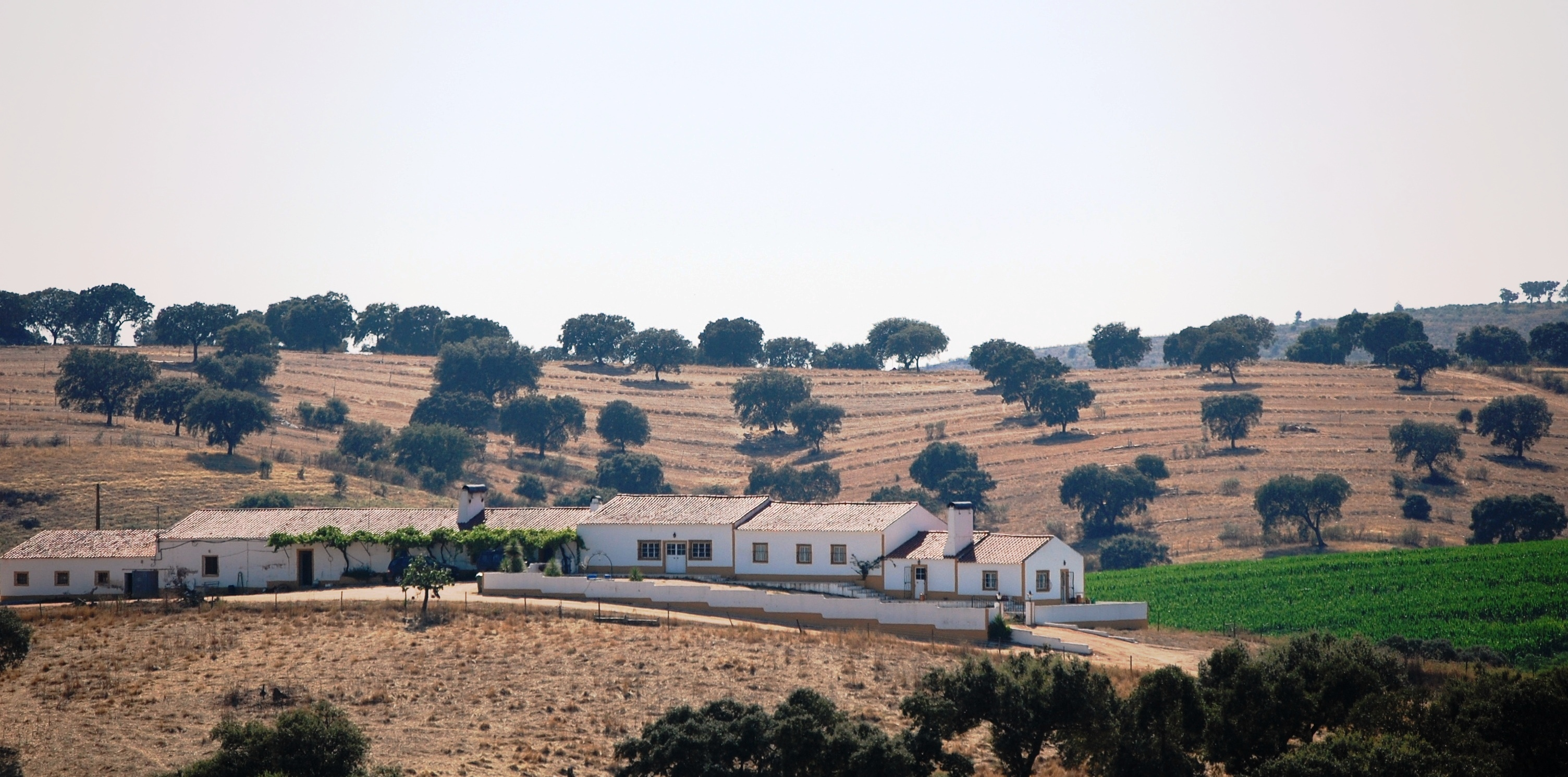 Monte Alentejo Portugal